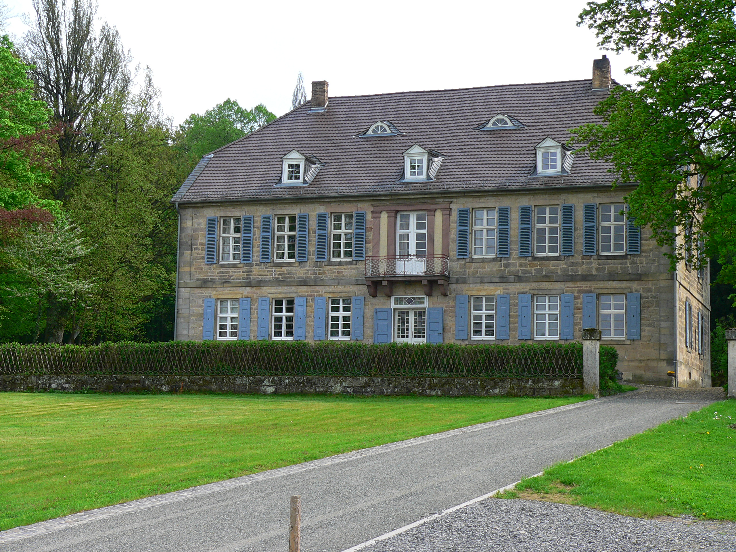 Schloss Großropperhausen in Frielendorf-Großropperhausen, Hessen, Regierungsbezirk Kassel, Schwalm-Eder-Kreis